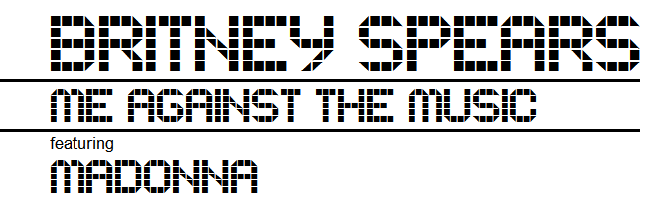 Logotipo del sencillo de Britney Spears "Me Against the Music (feat. Madonna)".